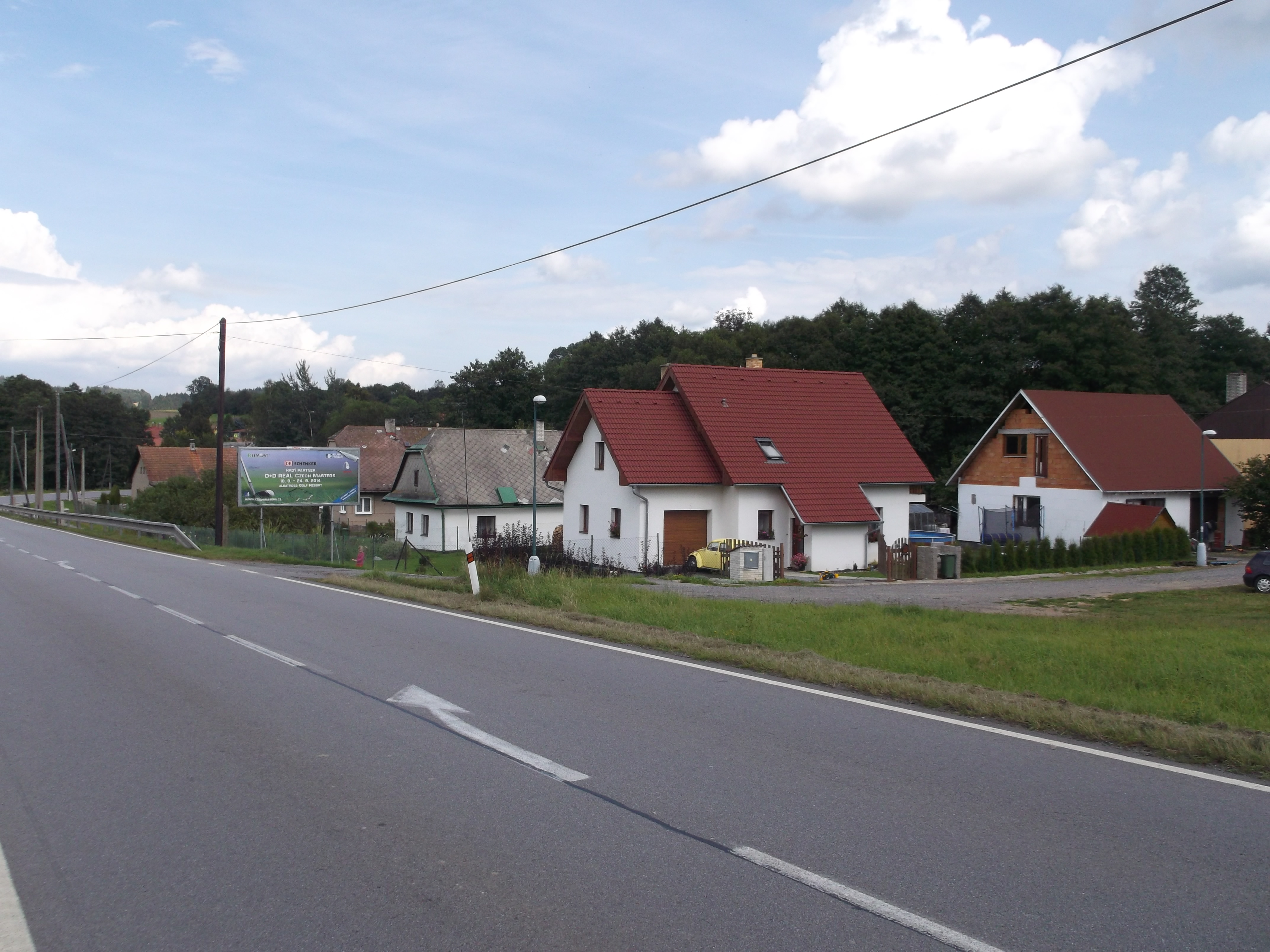 Chlum - celkový pohled (jižní část)